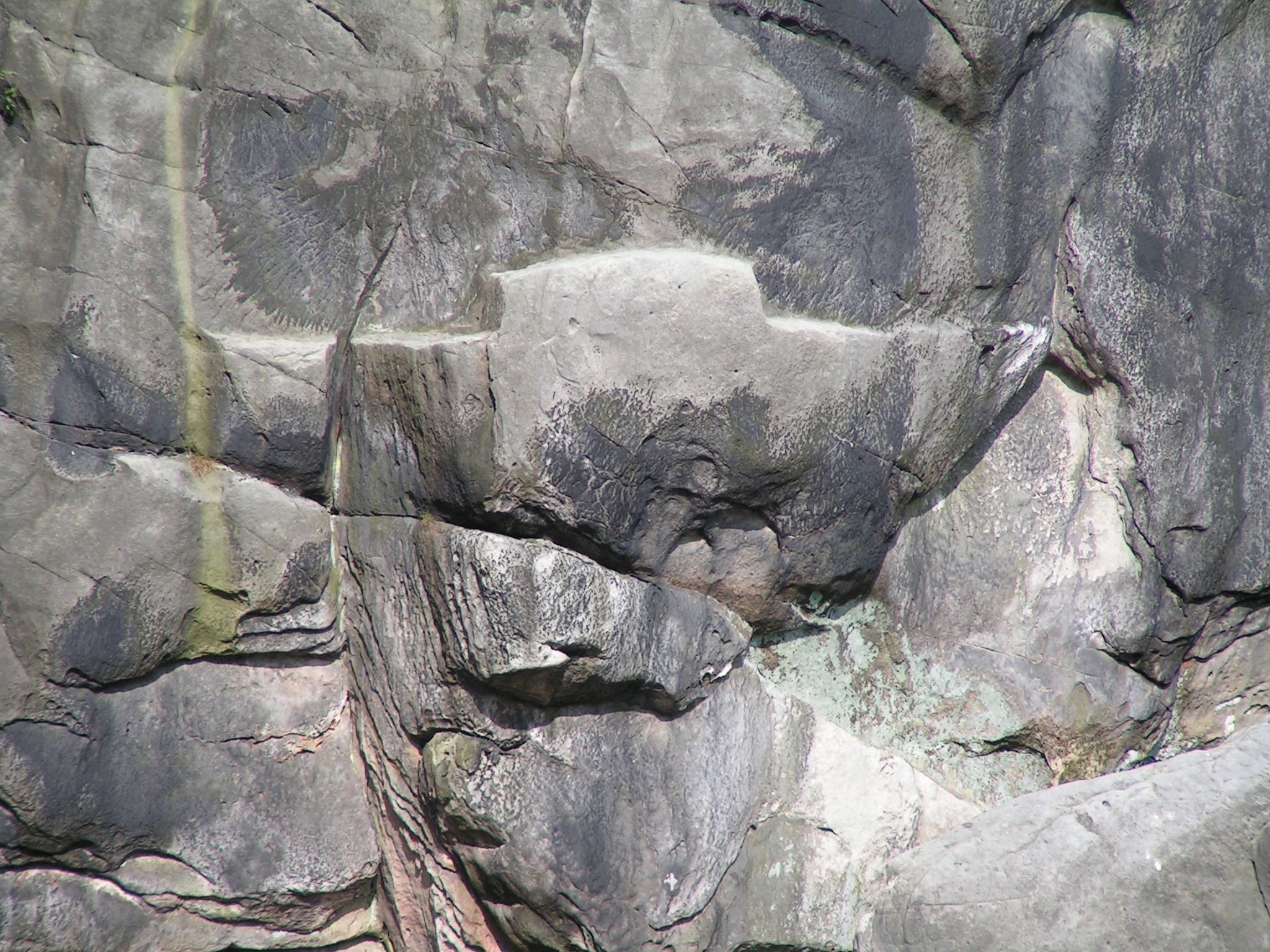 Externsteine, das so genannte „Felsenschiff“ (Motiv)